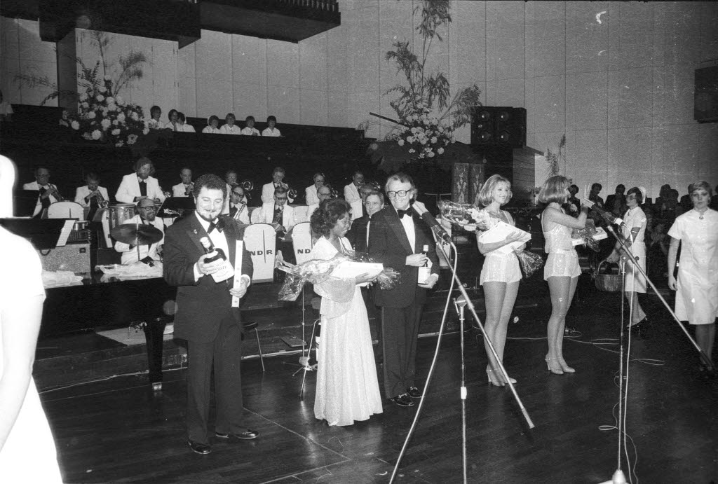 Im Bild v.l.n.r.: amerikanischer Opernsänger Cesare Curzi, amerikanische Opernsängerin Felicia Weathers, der Journalist und Moderator Werner Baecker sowie die Kessler-Zwillinge. Im Hintergrund ist das Tanzorchester des Norddeutschen Rundfunks (NDR).